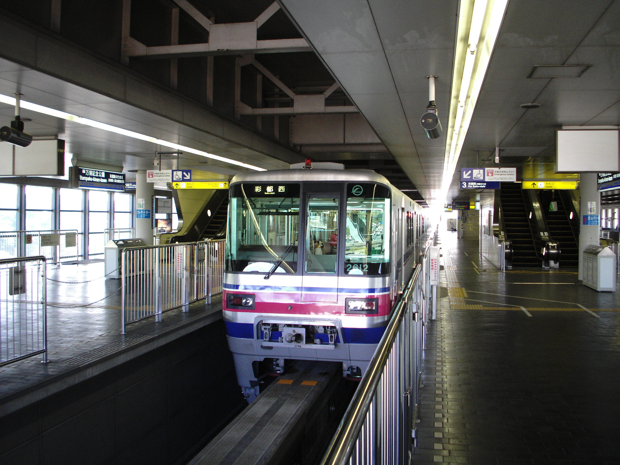 大阪モノレール 万博記念公園駅 (大阪府)ホーム